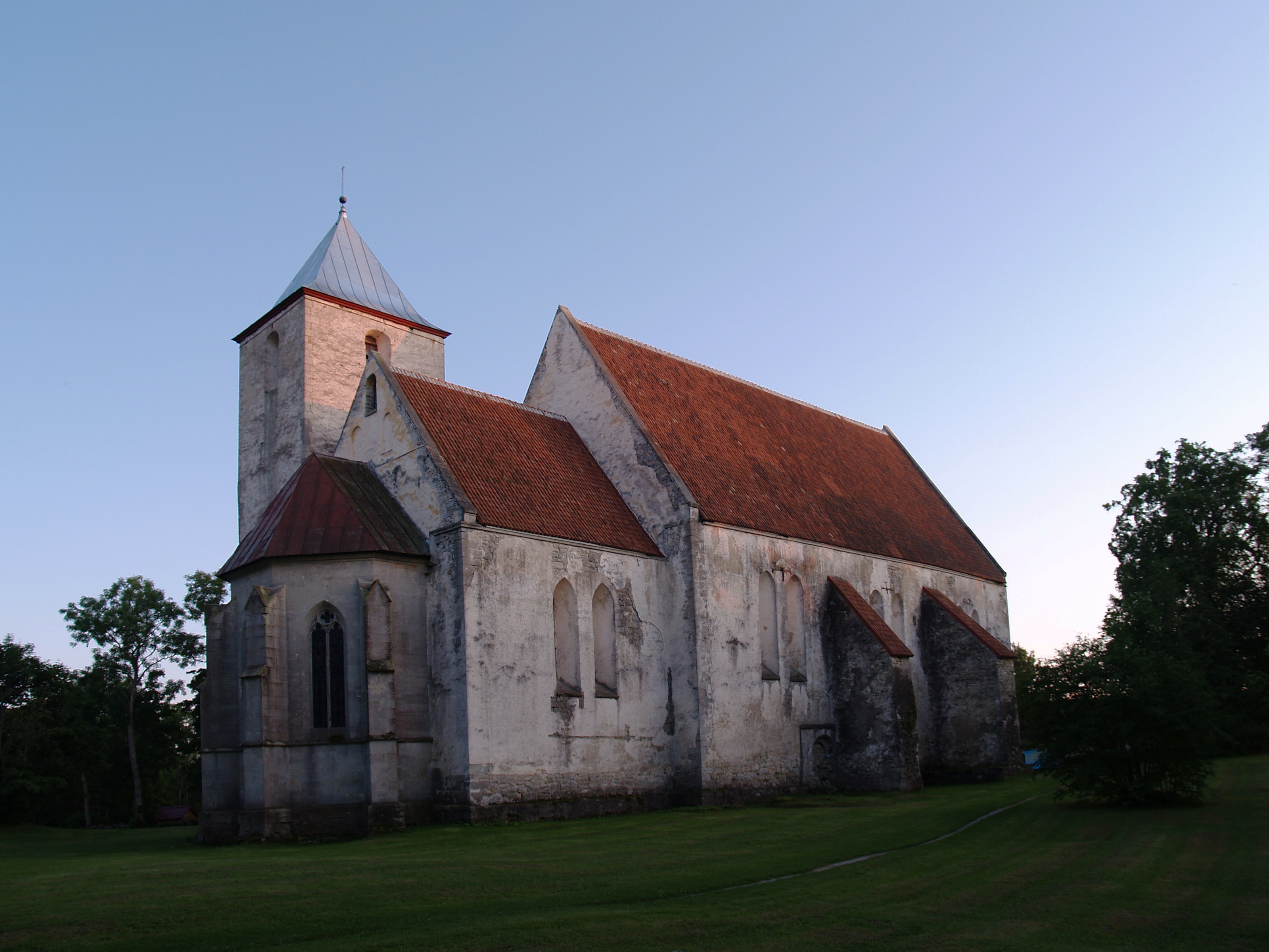 Valjala kirik